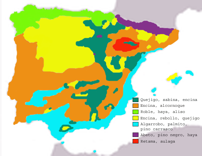 Ocupación ideal de las masas boscosas, en la Península Ibérica.